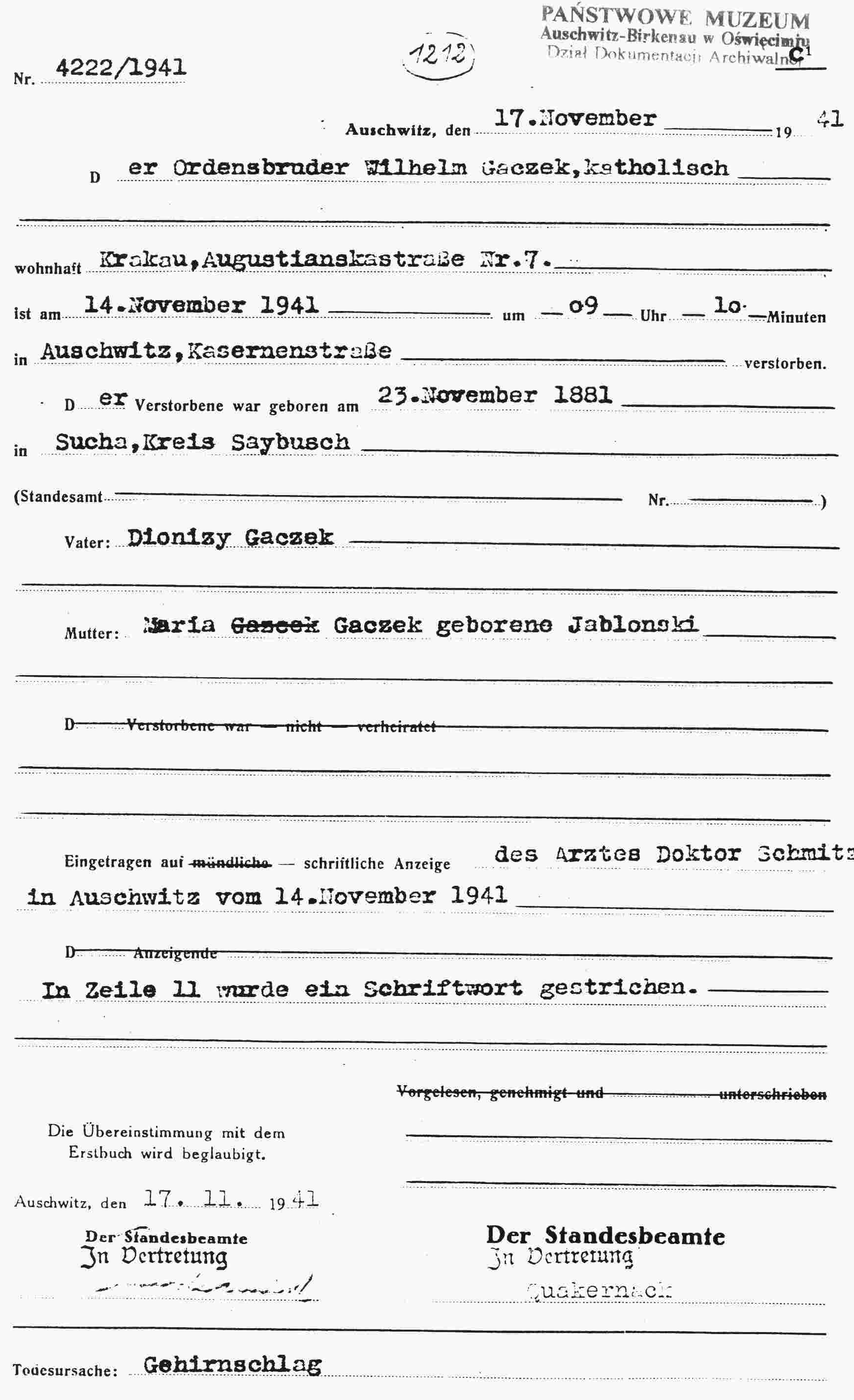 Swiadectwo zgonu ks. Wilhelma Gaczka pochodzące z zasobów Archiwum Państwowego Muzeum Auschwitz – Birkenau w Oświęcimiu.